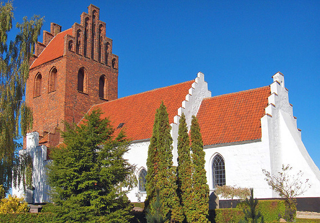 fra sydøst